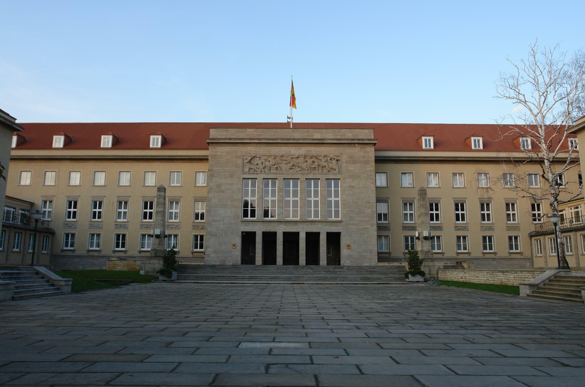 zentraler Platz - Luftgaukommando Dresden